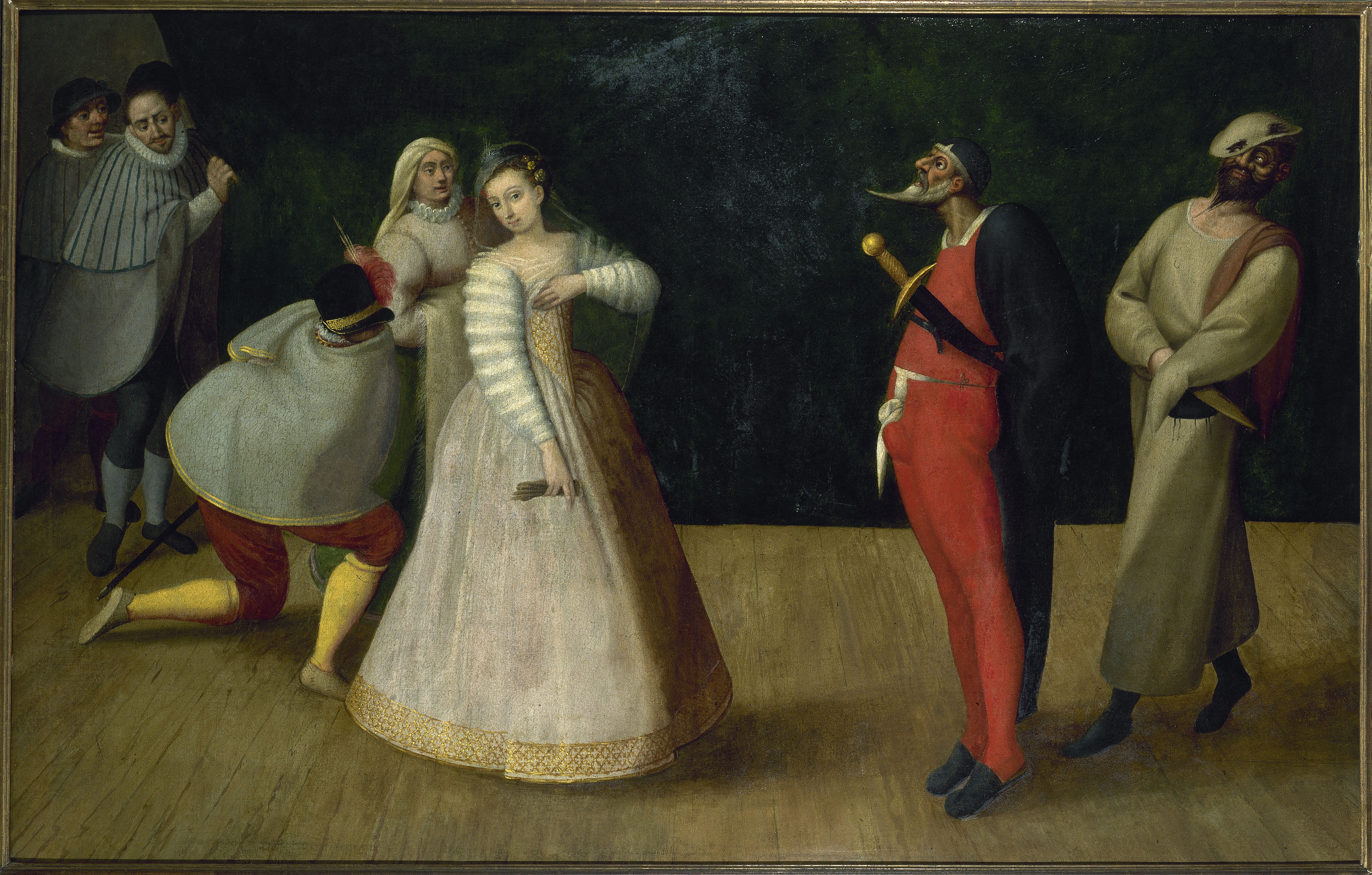 Troupe de comédiens italiens présumés être la troupe des Gelosi, avec Isabella Andreini.